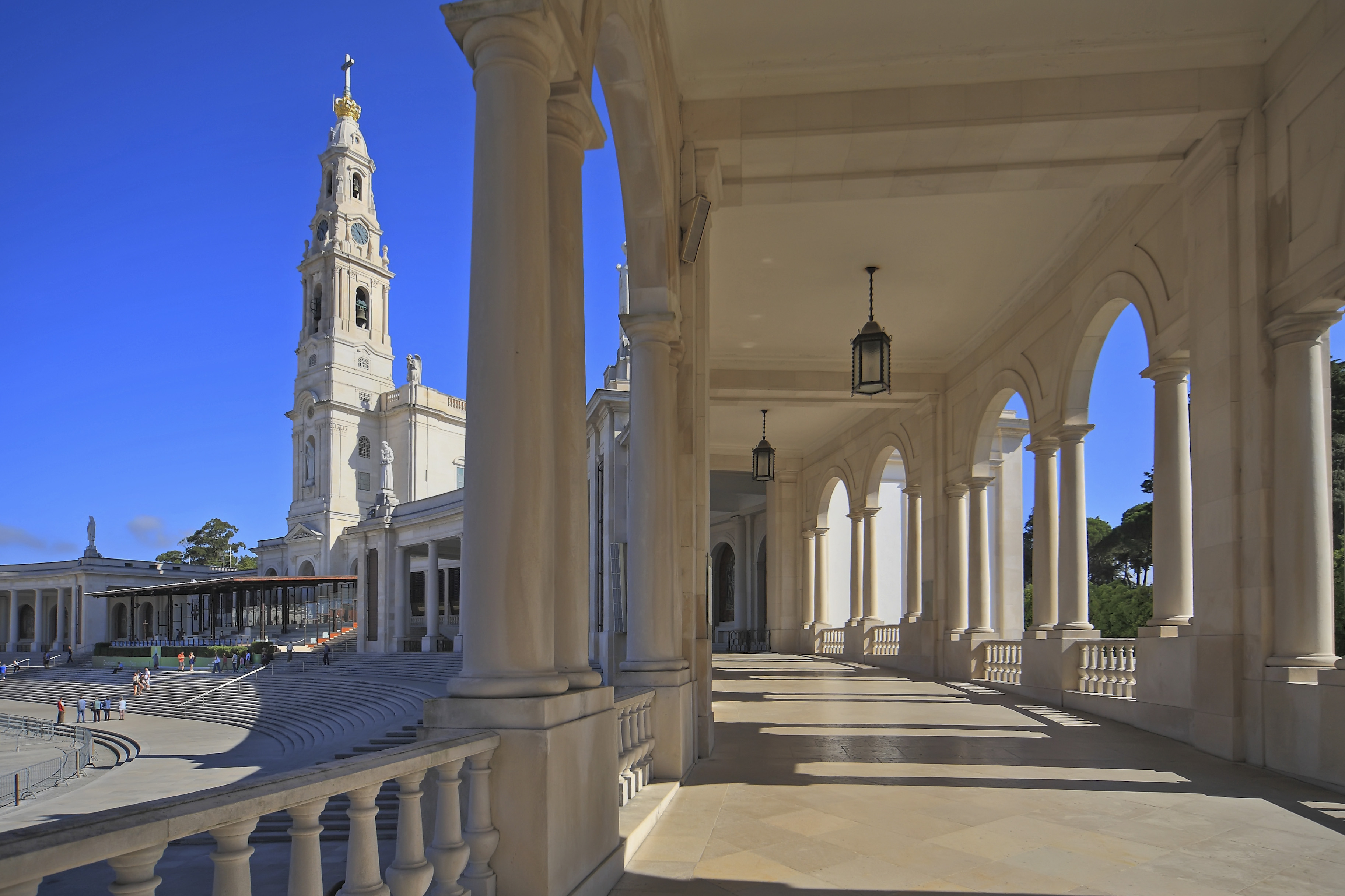 La Basílica de Nuestra Señora del Rosario, comenzó a ser construida en 1928.